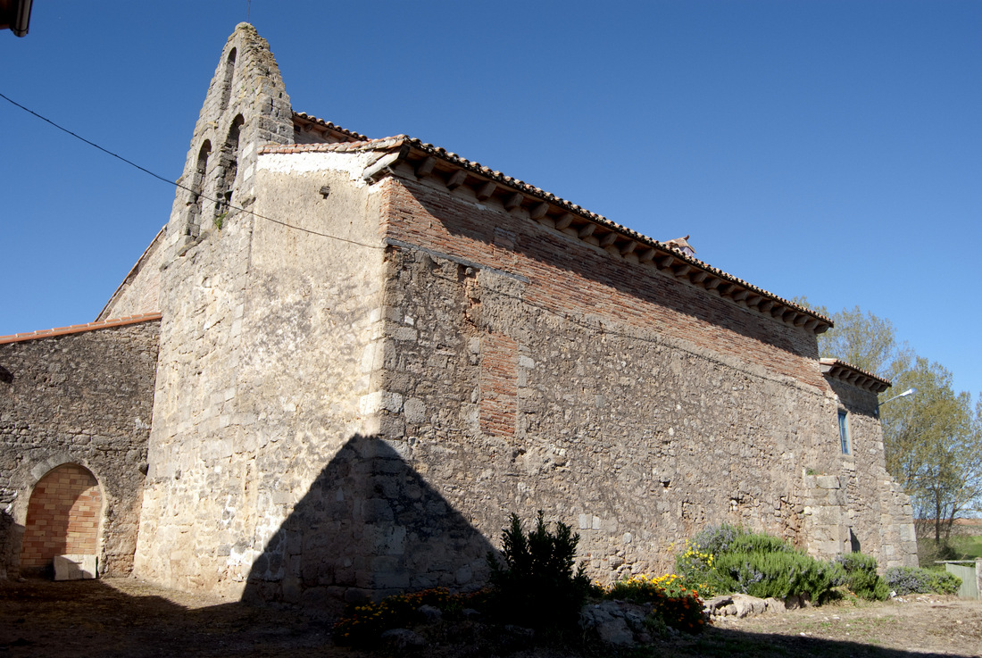 Iglesia de Rezmondo. Cara sur.